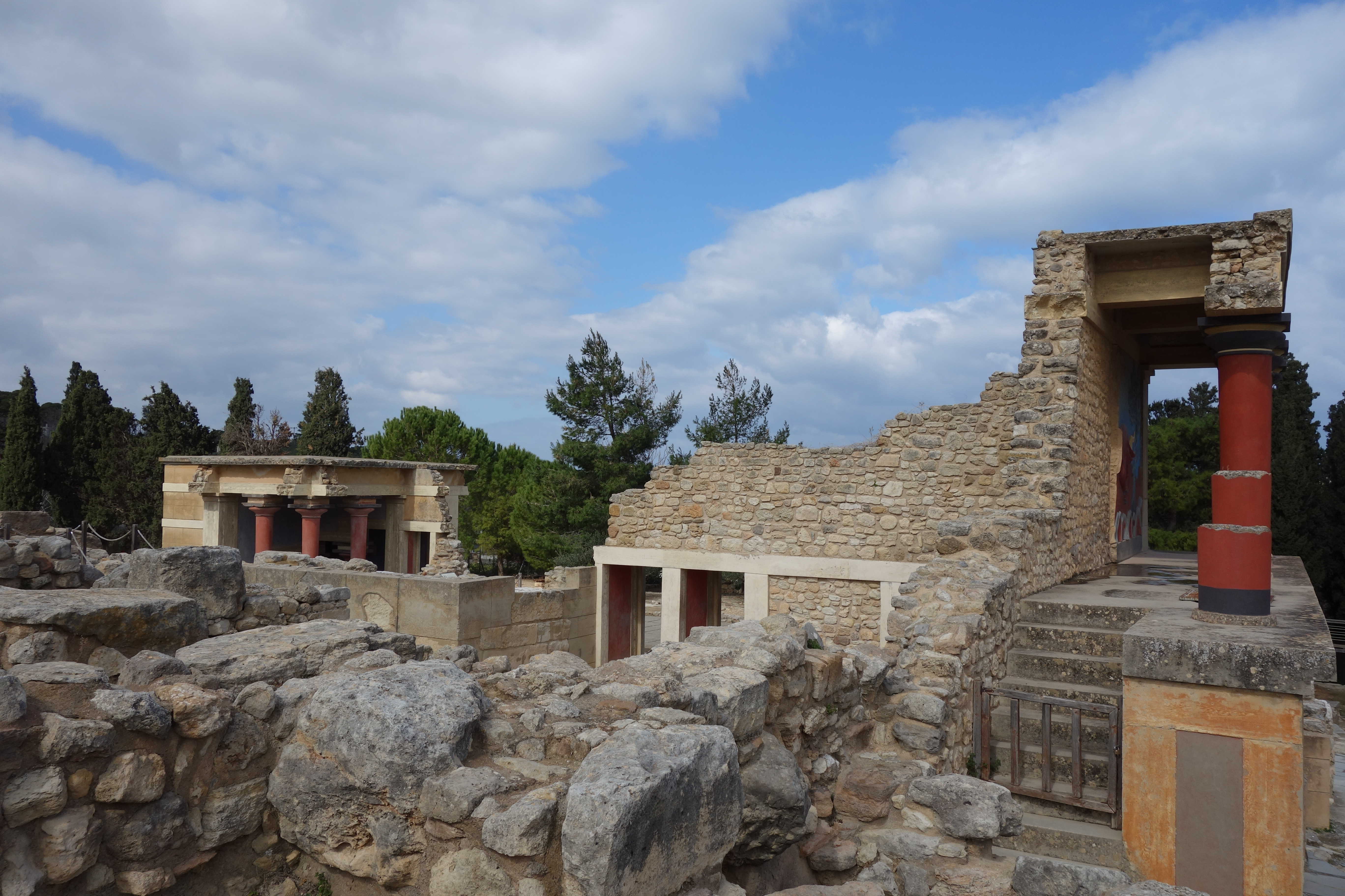 ミーノータウロス伝説の舞台となったクノッソス宮殿